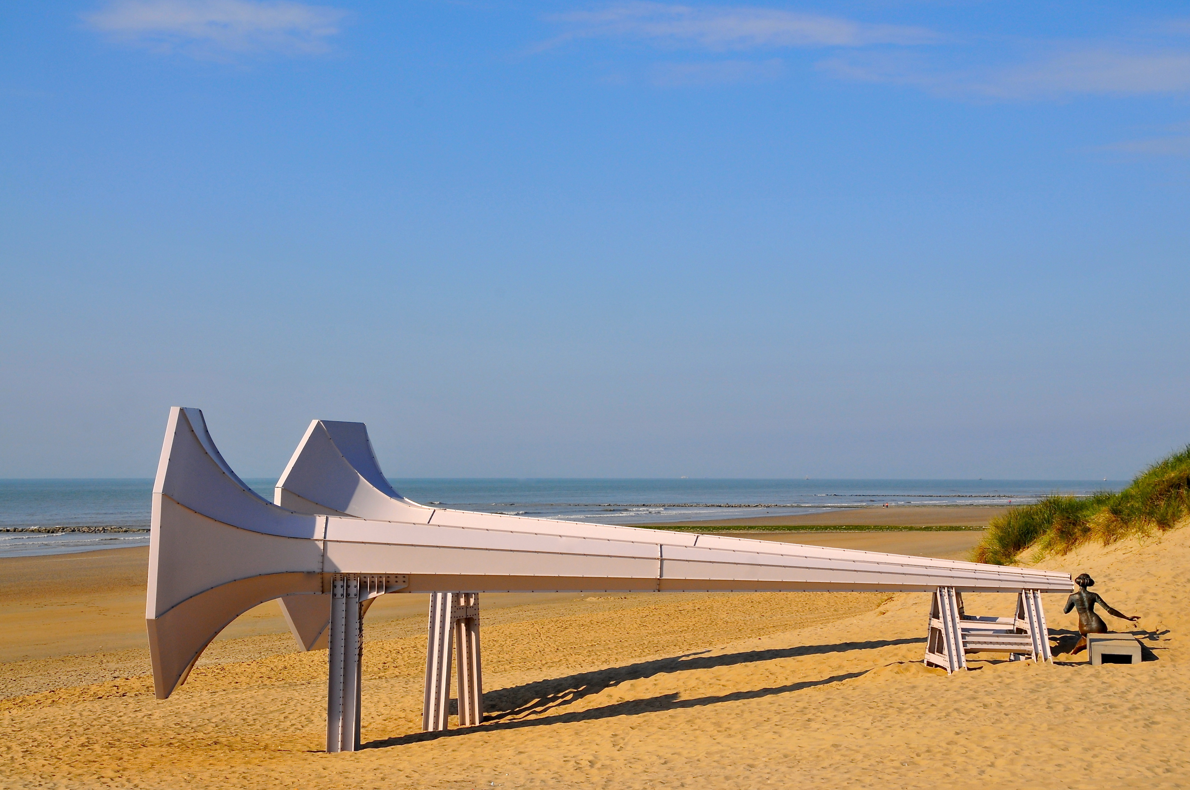 'I Can Hear It' (2012) van de Letse kunstenaar Ivars Drulle. Het idee om met de grootste aandacht door een hoorn naar de zee te luisteren, heeft onmiskenbaar poëtische charme. Maar het is gebaseerd op een militair instrument. Voor de invoering van de radar werden grote hoorns in het leger gebruikt om het geronk van vijandelijke vliegtuigen op te vangen. Bron